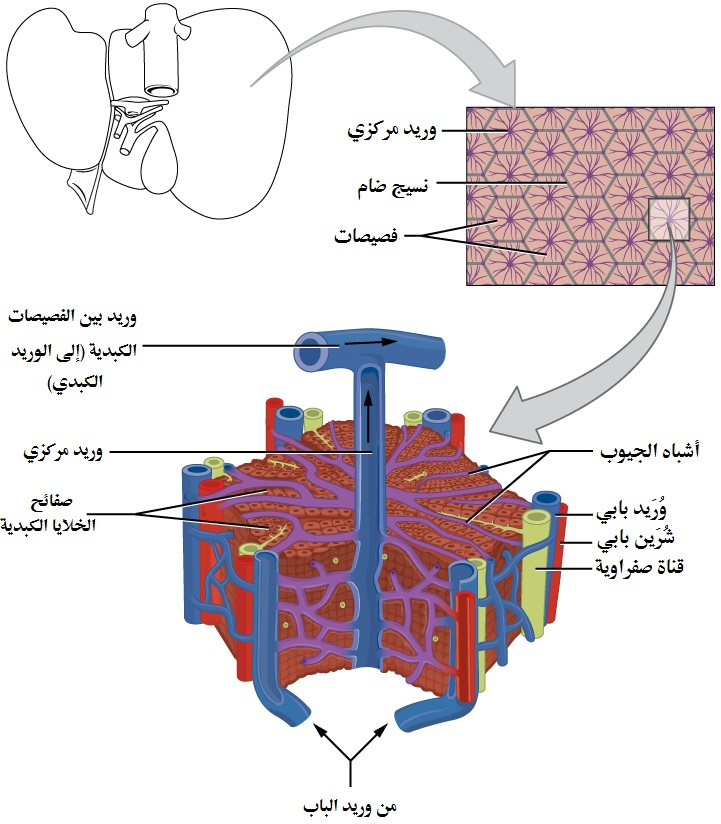 تظهر البنية المجهرية للكبد